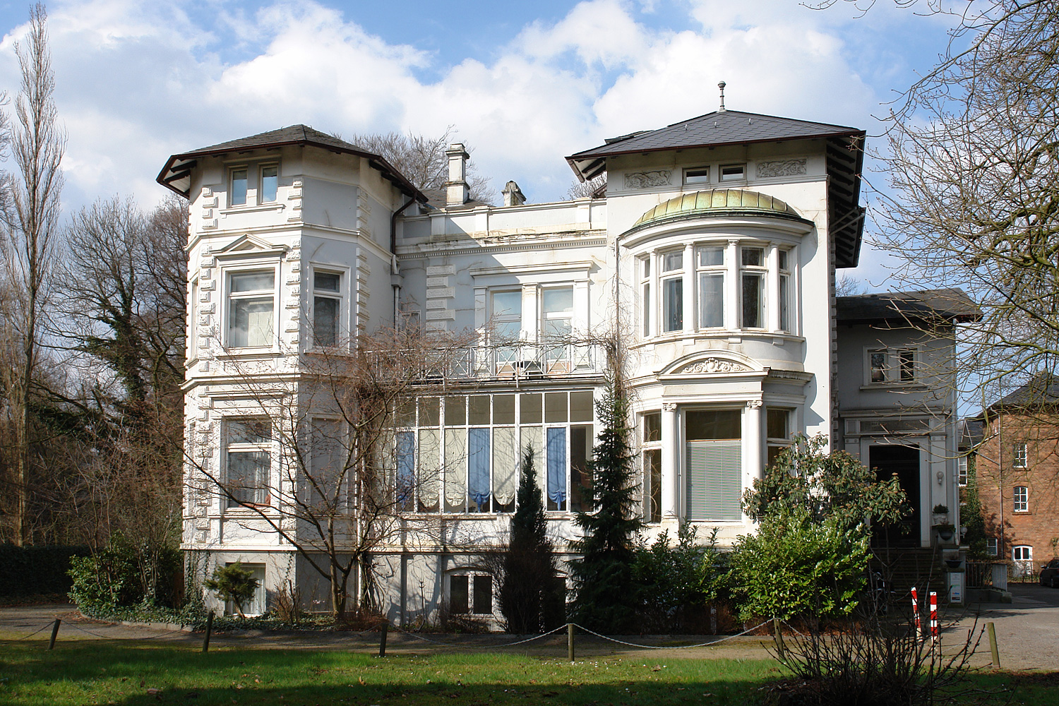 Nordwolle in Delmenhorst. Villa des Unternehmers Carl Lahusen, erbaut ab 1886